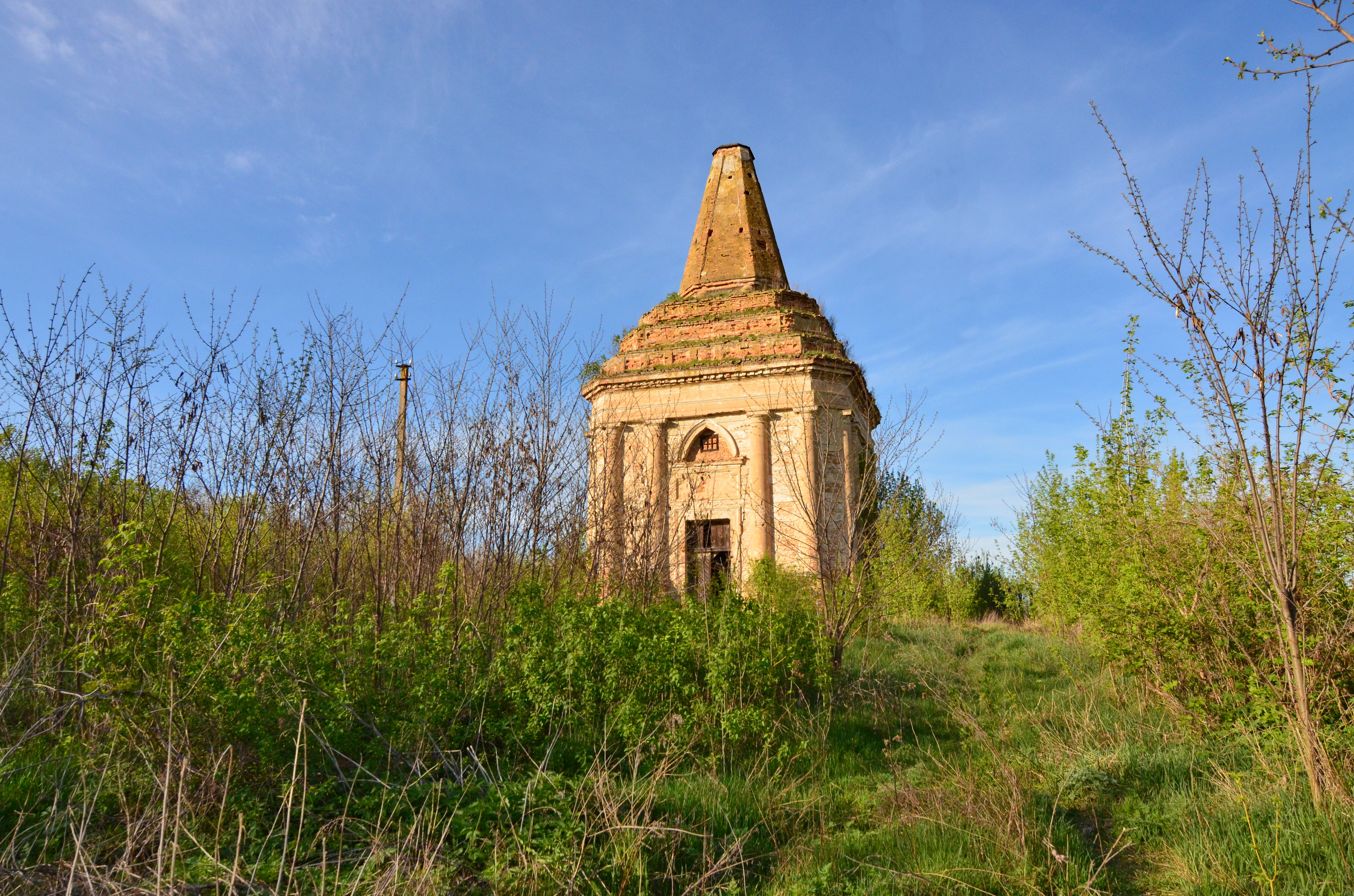 Усипальниця родини Підгірських (мур.), село Антонів